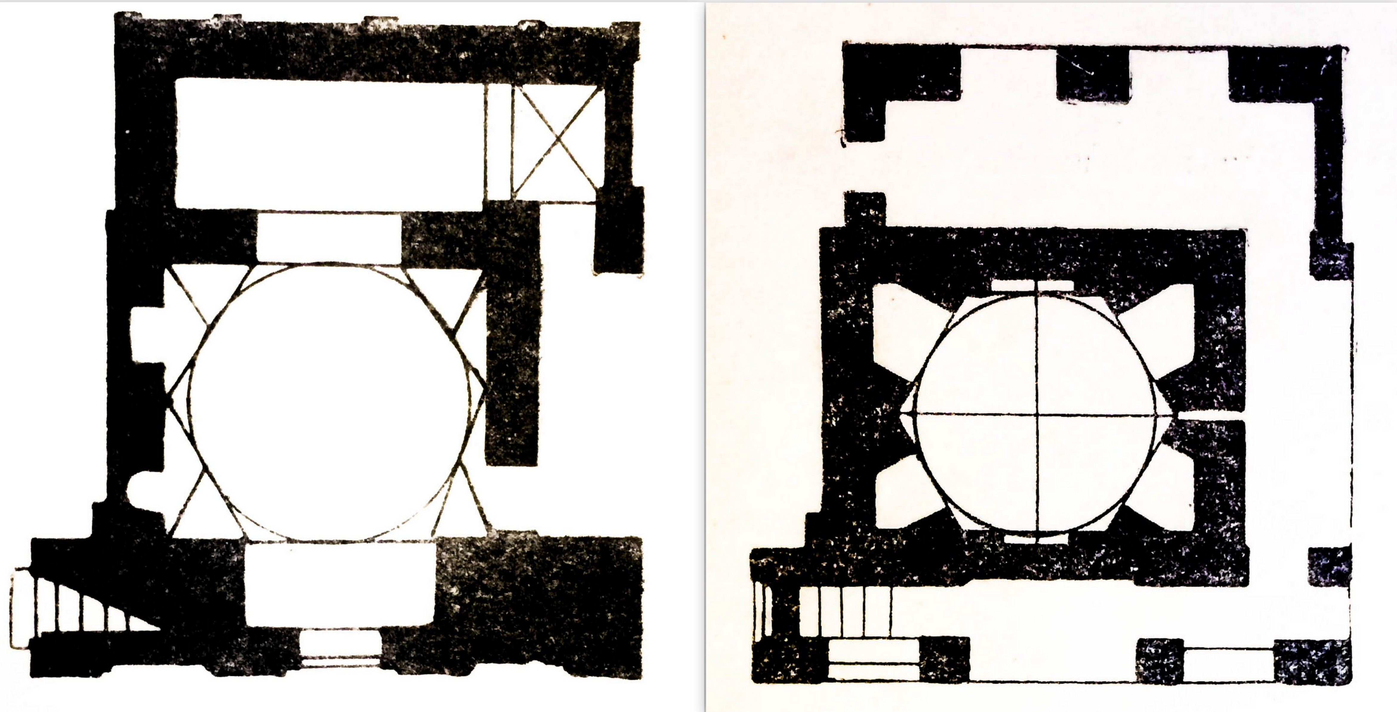 Gəncə imamzadə türbəsinin birinci və ikinci mərtəbələrinin planı